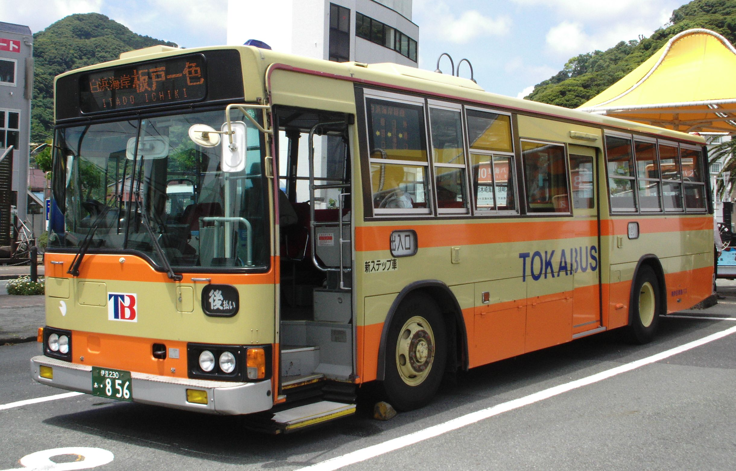 南伊豆東海バス 856（三菱ふそう・エアロスター U-MP218M）